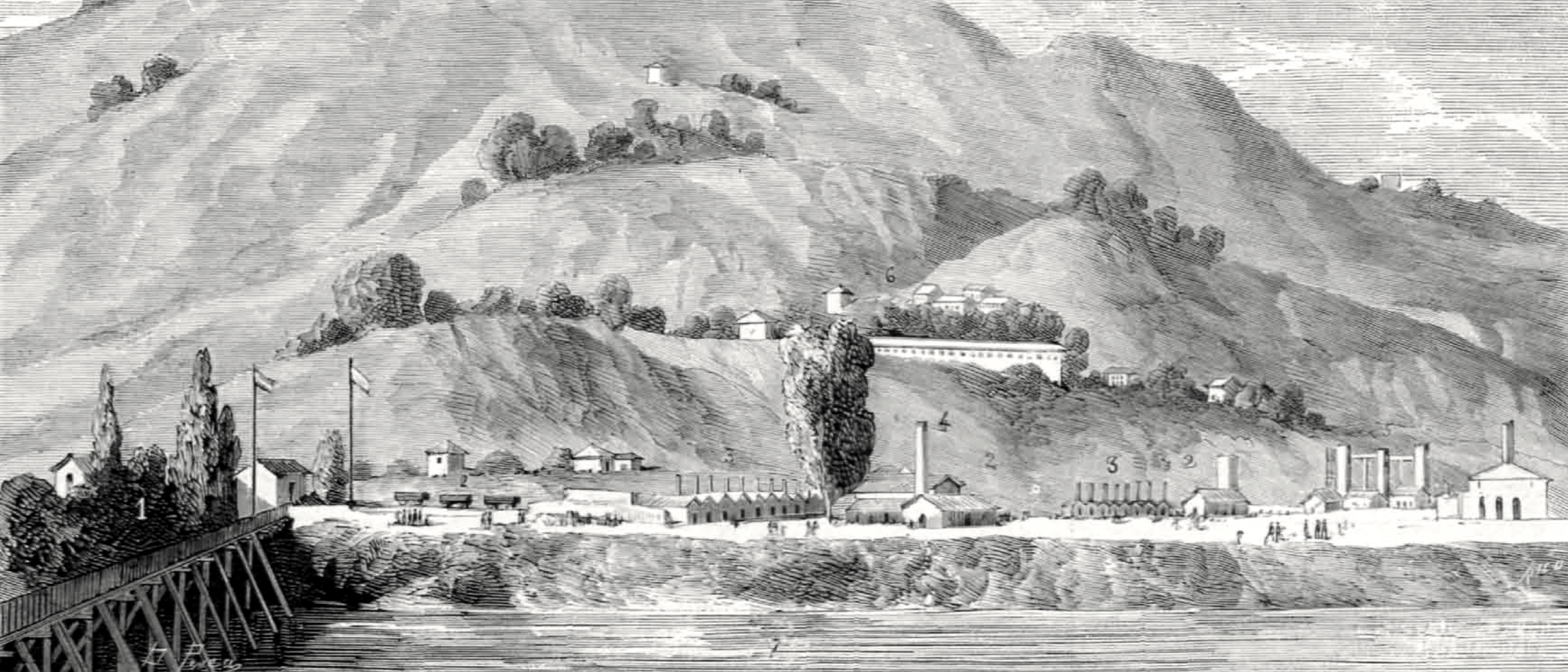 MIERES (Oviedo): Vista de la fábrica de hierros de D. Numa Ghilhou. 1. Puente de hierro y madera sobre el río Caudal; 2. Tramvía; 3. Hornos de cock; 4. Horno alto de fundición; 5. Hornos de fundición y talleres; 6. Viviendas de Ios obreros; 7. Río Caudal; 8. Minas de carbón —(Segun cróquis del Sr. Sanahuja.)